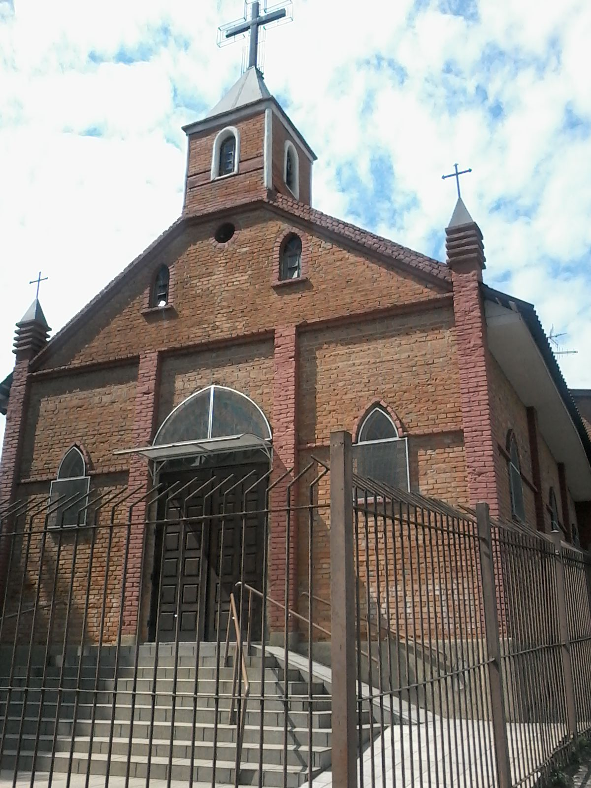 Igreja fundada século XVII que se encontra hoje no distrito de Guaianases